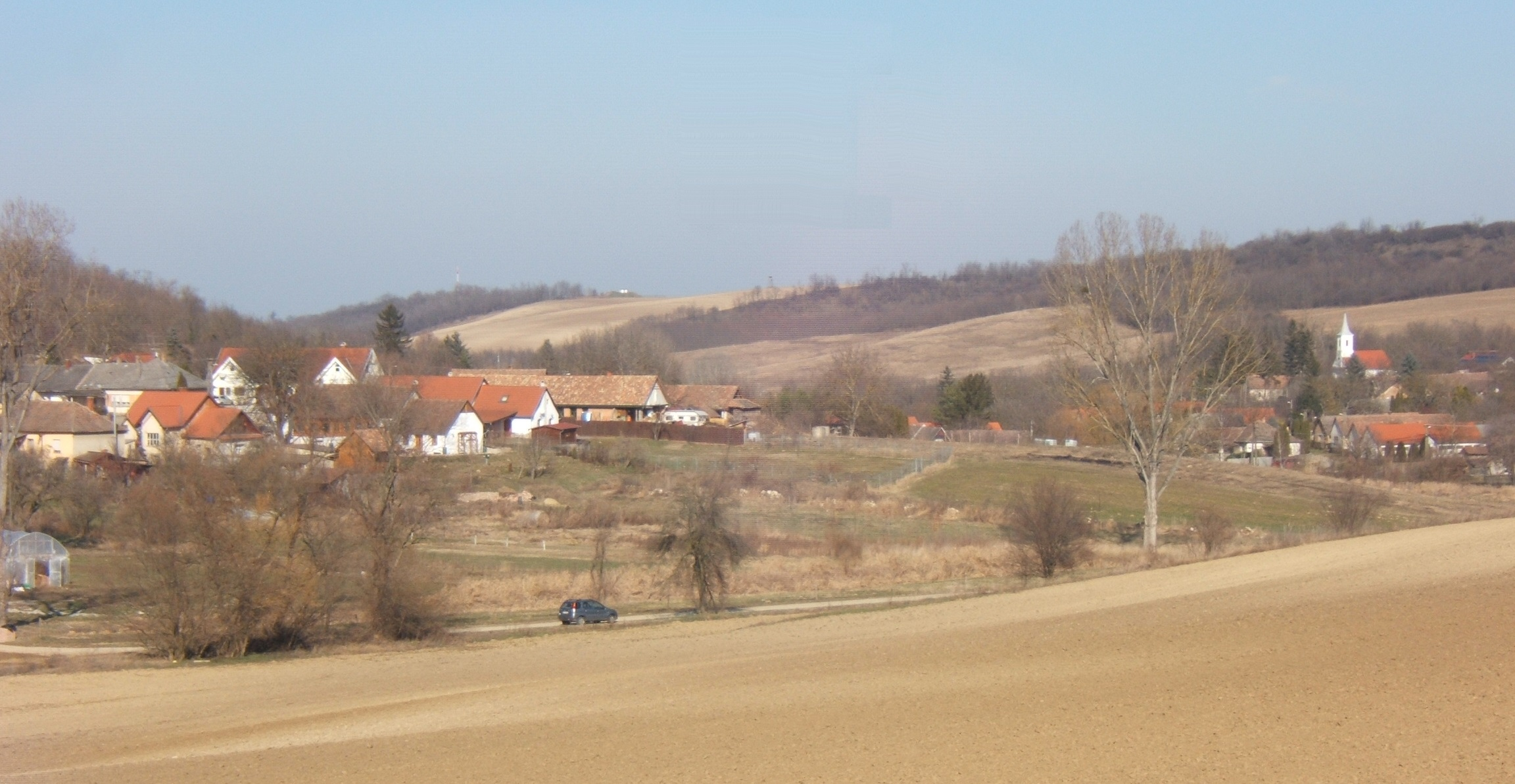 Nyim, látkép